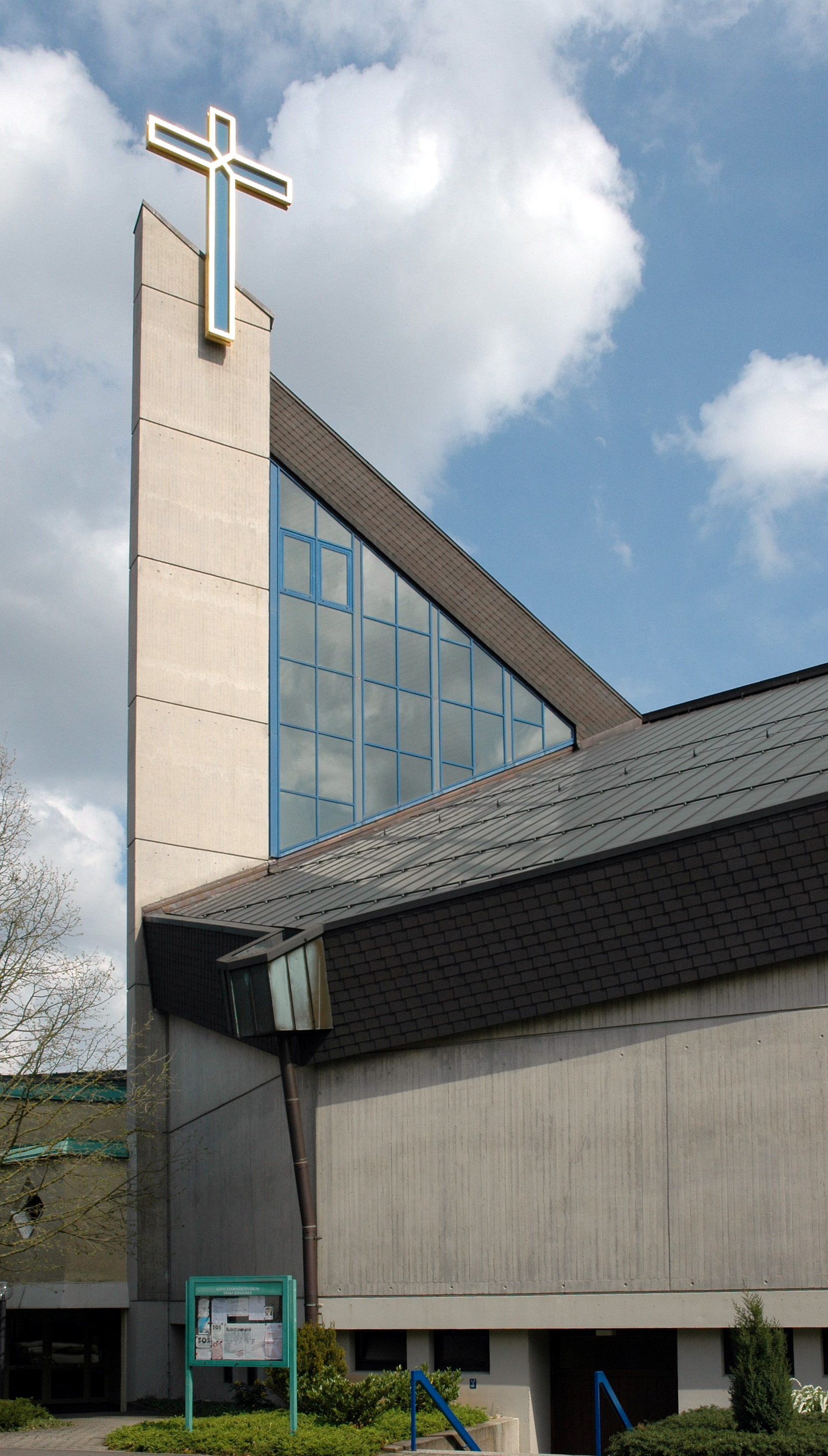 Kath. Kirche St. Johannes in Neckarsulm.